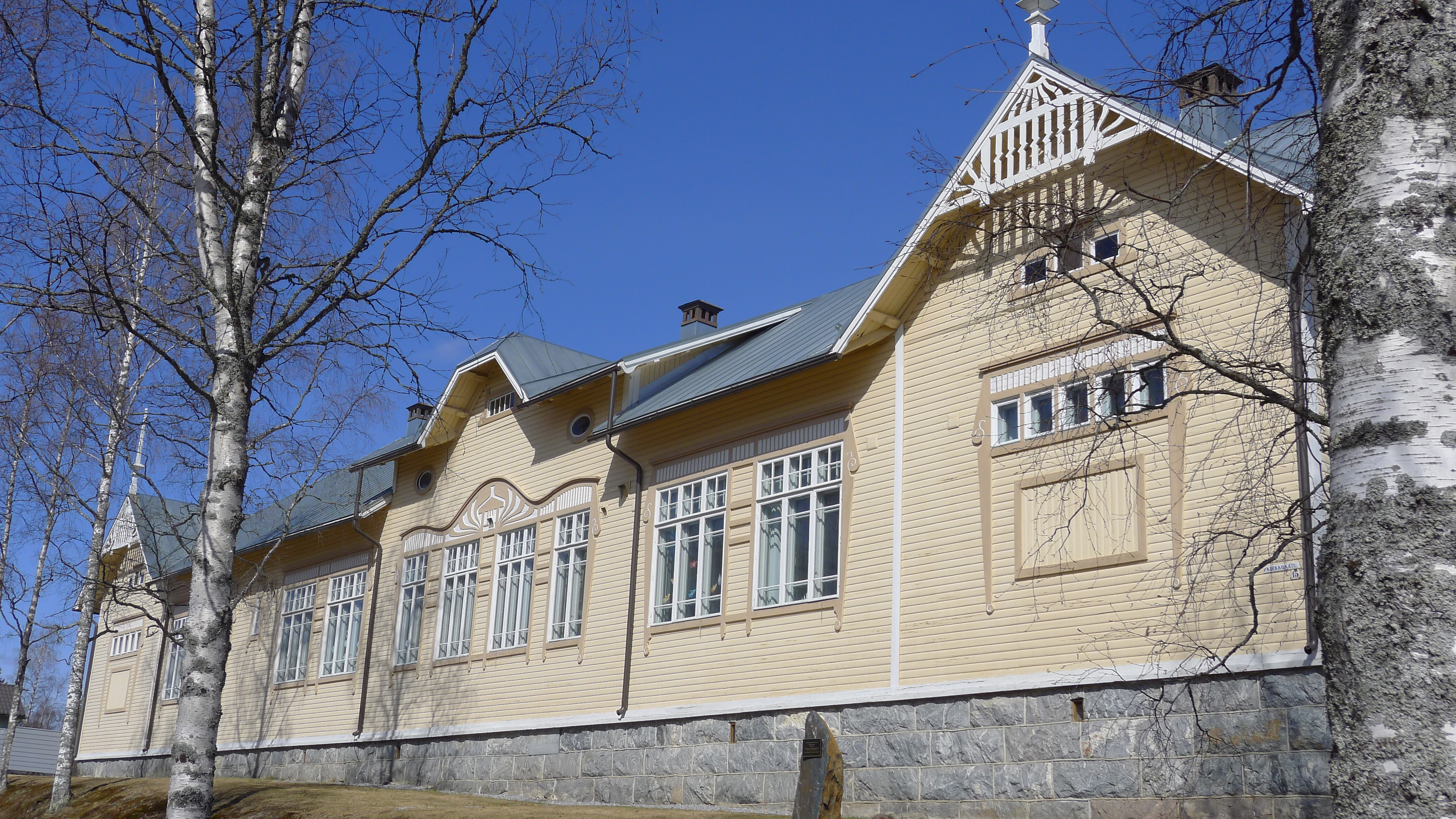 Old secondary school, Nurmes. Образец городской деревянной архитектуры начала 20 века